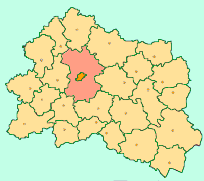 Orel Oblast map by Al Silonov Карта районов Орловской области